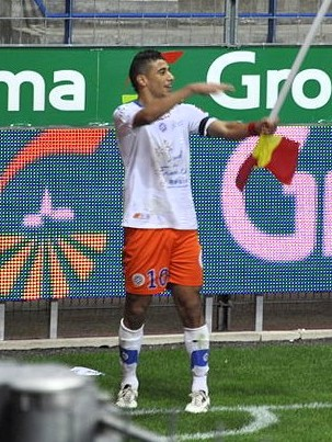 Younès Belhanda à Caen le 22 Octobre 2010 ( crop d'après la photo de Benoit-caen ).